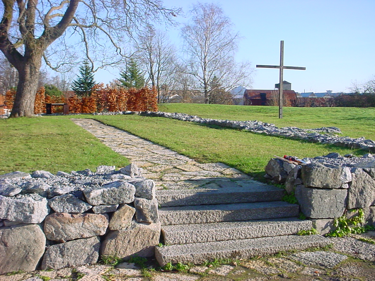 Enköping, Klosterparken, Ruiner efter kyrkan tillhörande det medeltida franciskanerklostret.